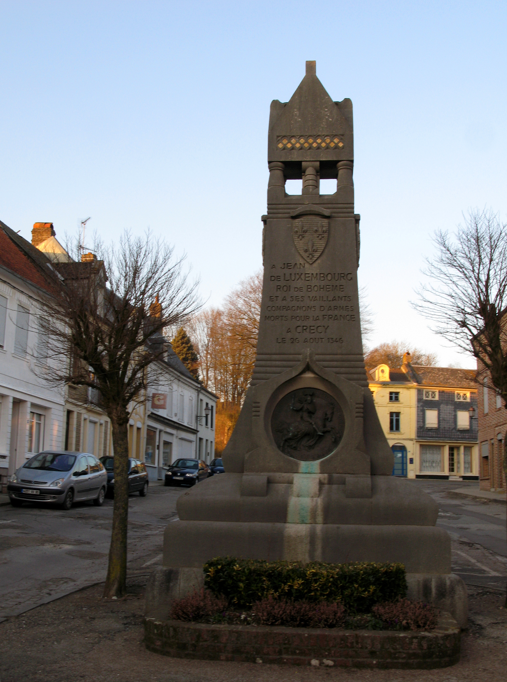 Crécy-en-Ponthieu (Somme, France) - Le monument dédié à Jean de Luxembourg. .